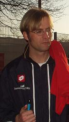 Fußballtrainer Jürgen Klopp